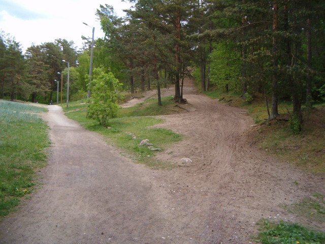 Sütiste parkmets. Mustamäe nõlv Mustamäe ja Nõmme piiril